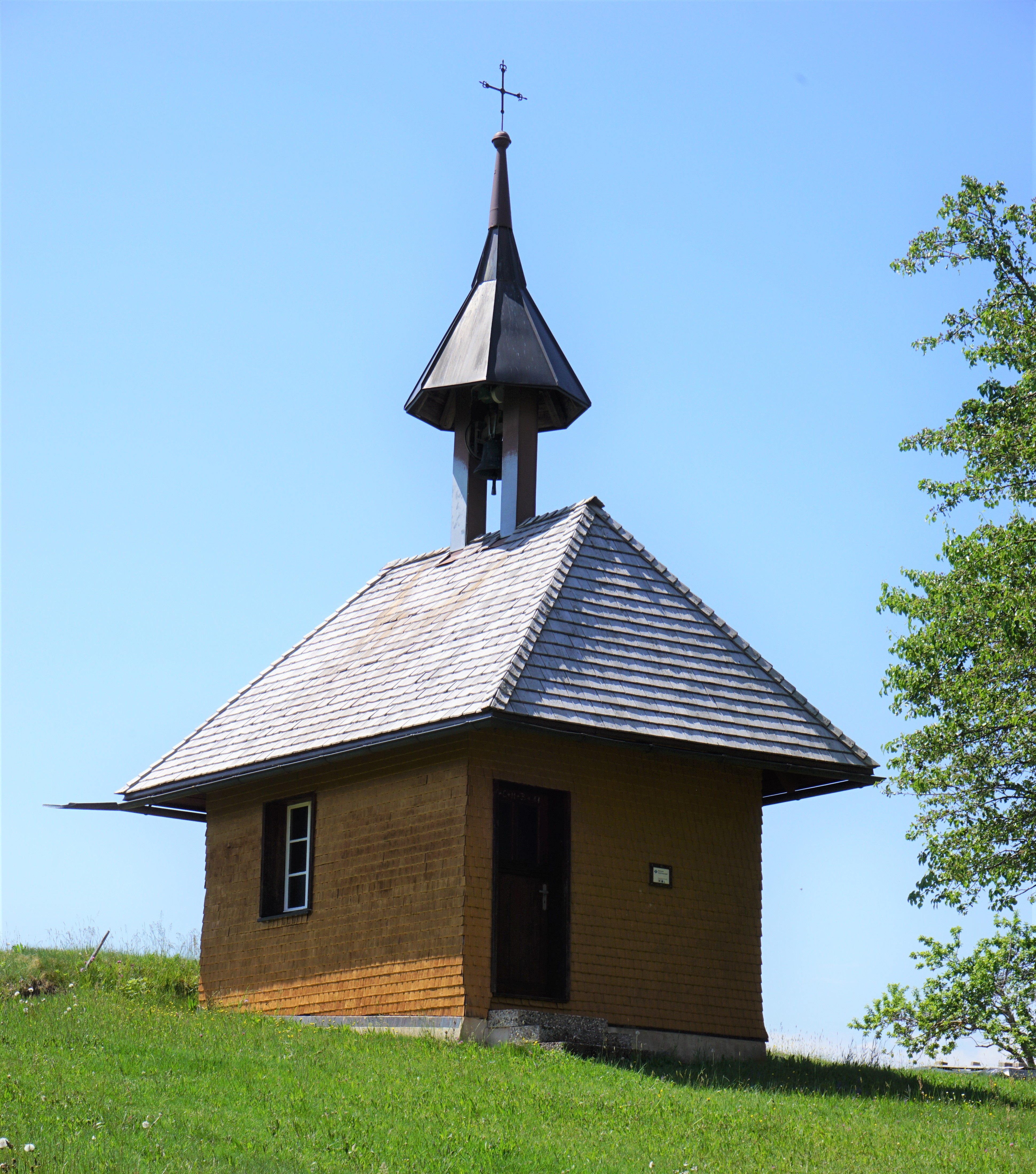 St. Marien-Kapelle in Fröhnd Vorder-Holz. Ursprünglich 1714 errichtet - hier der Neubau von 1953.